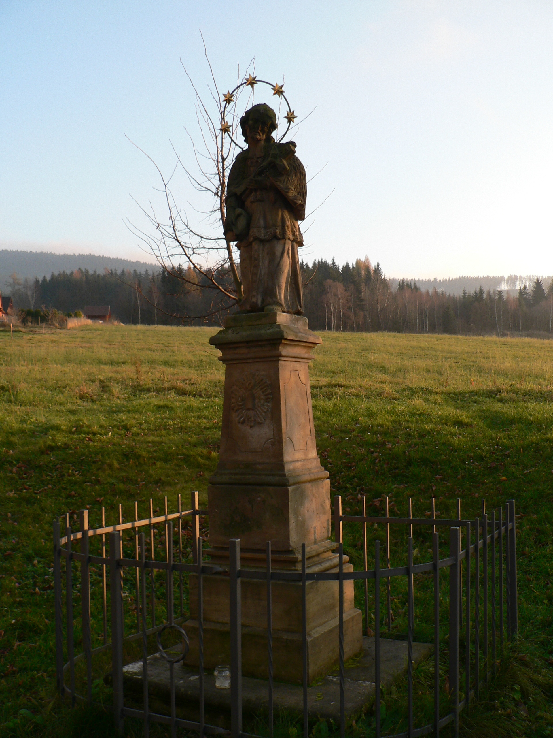 Kostel svatého Filipa a Jakuba (Hraběšice), socha Jana Nepomuckého